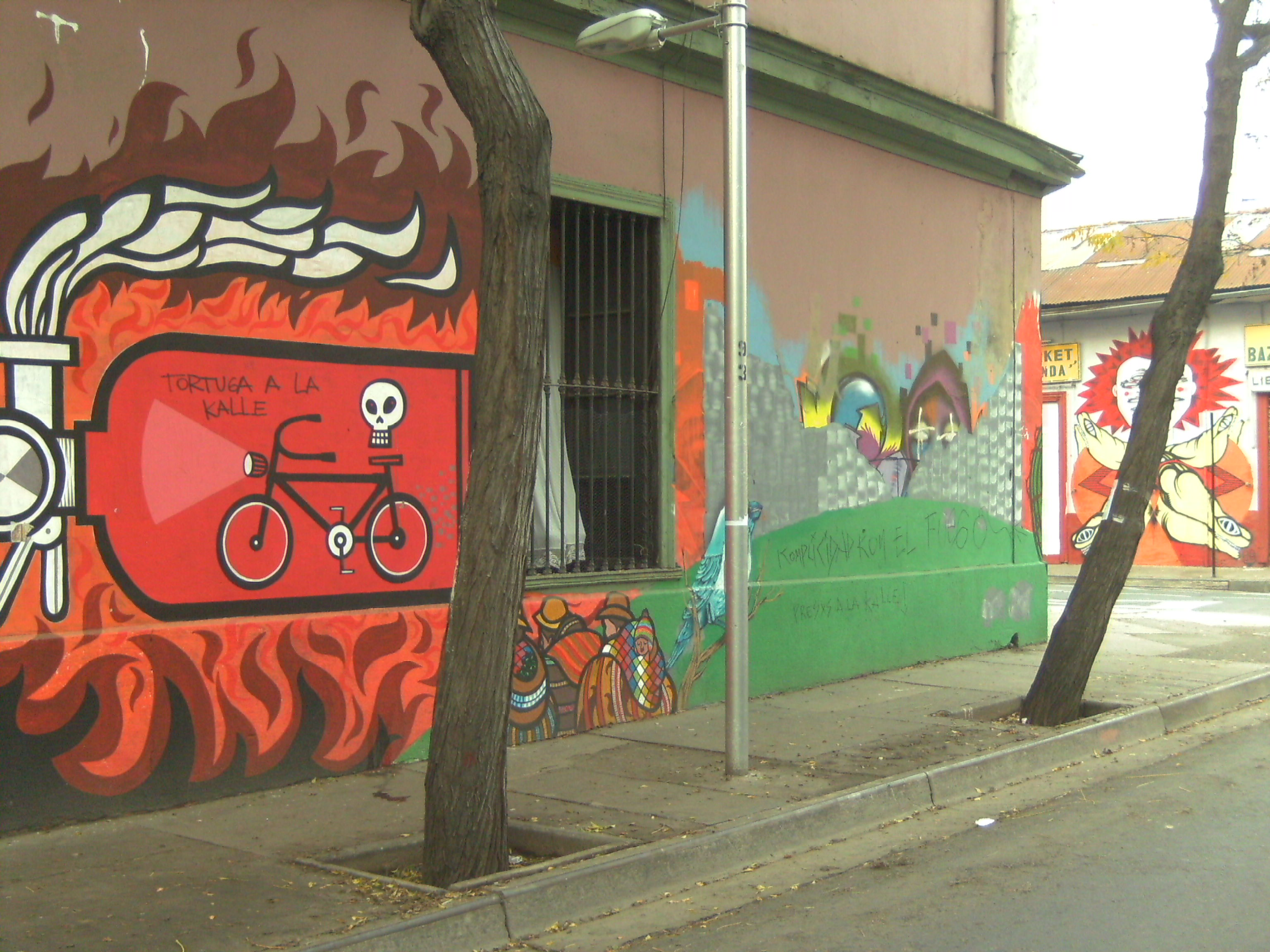 Imàgenes de murales decorativos del barrio Yungay en Santiago de Chile